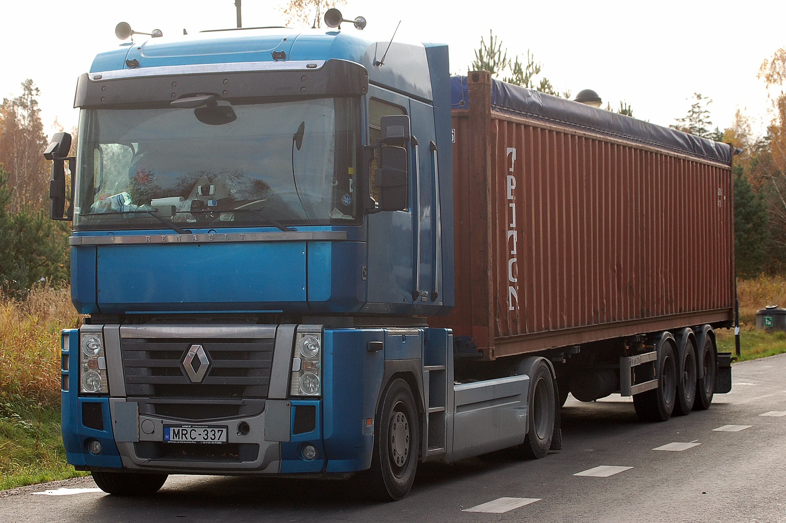 Renault 460 DXI, Euro5 lastbil.